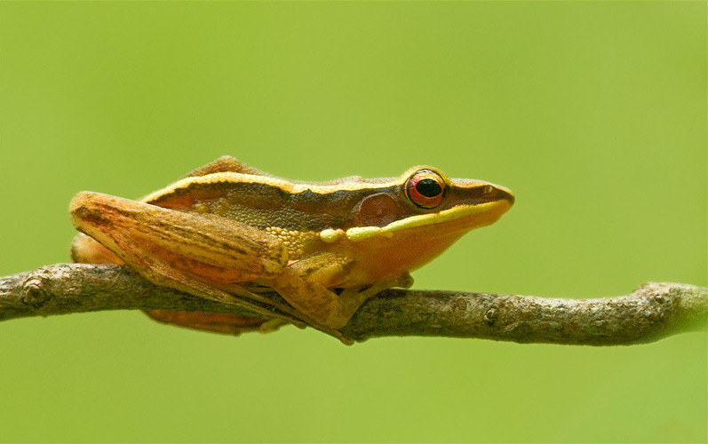 Golden frog (Hylarana aurantiaca)